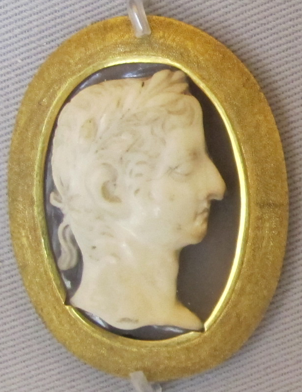 Glittica romana, nerone cesare, figlio di germanico, onice, I sec dc.